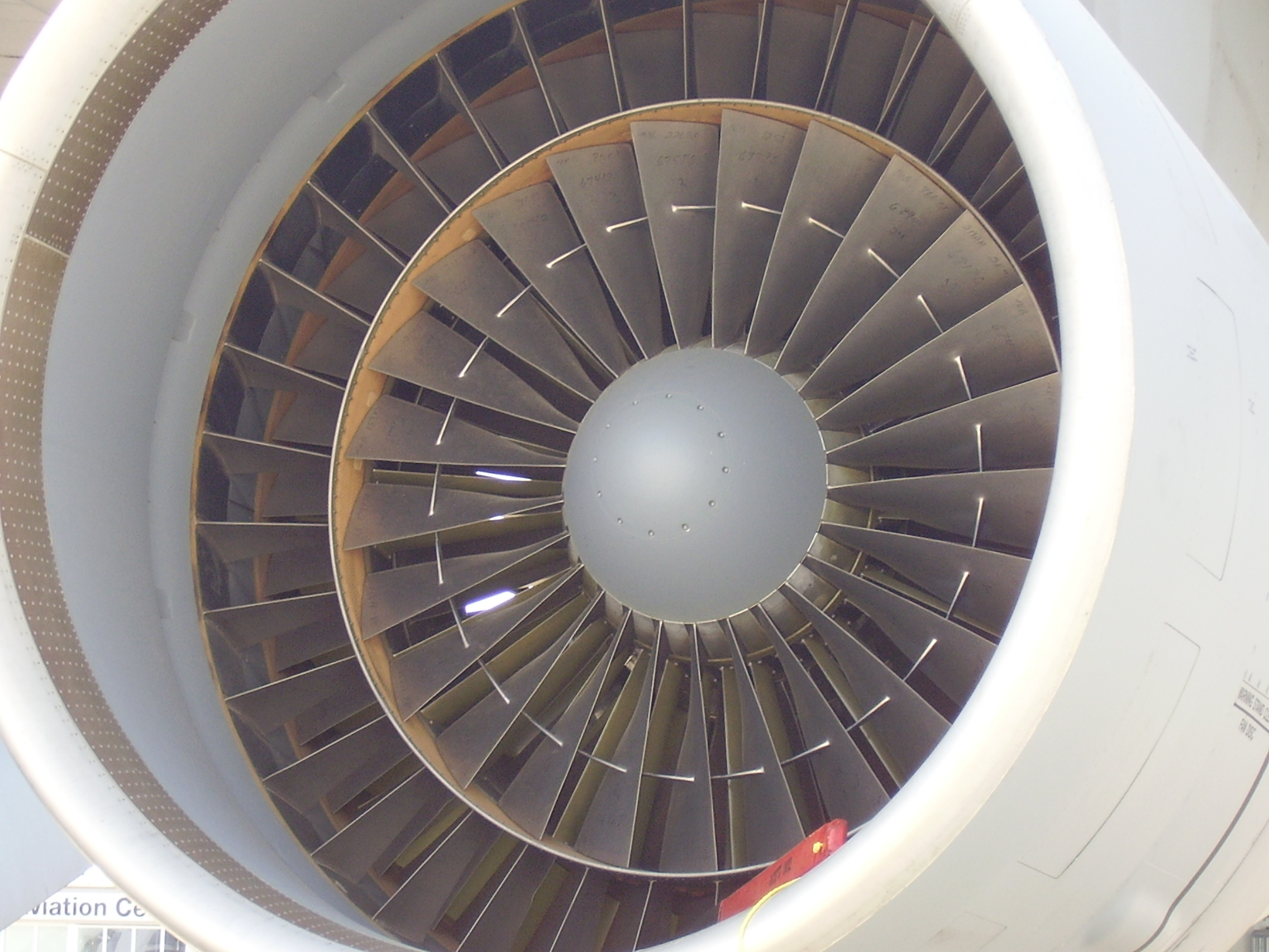 ILA 2008